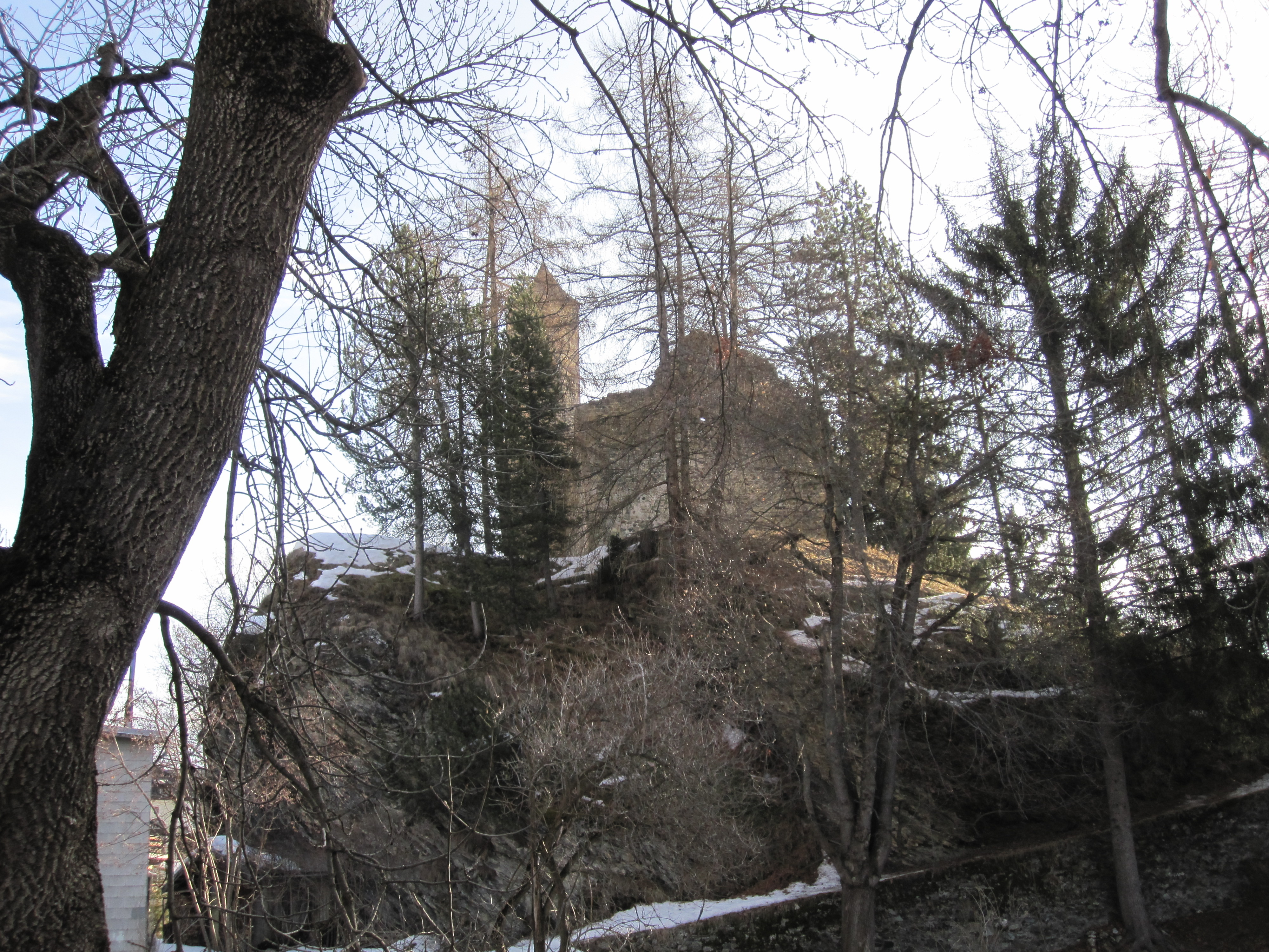 Kirchenruine San Peder in Sent GR